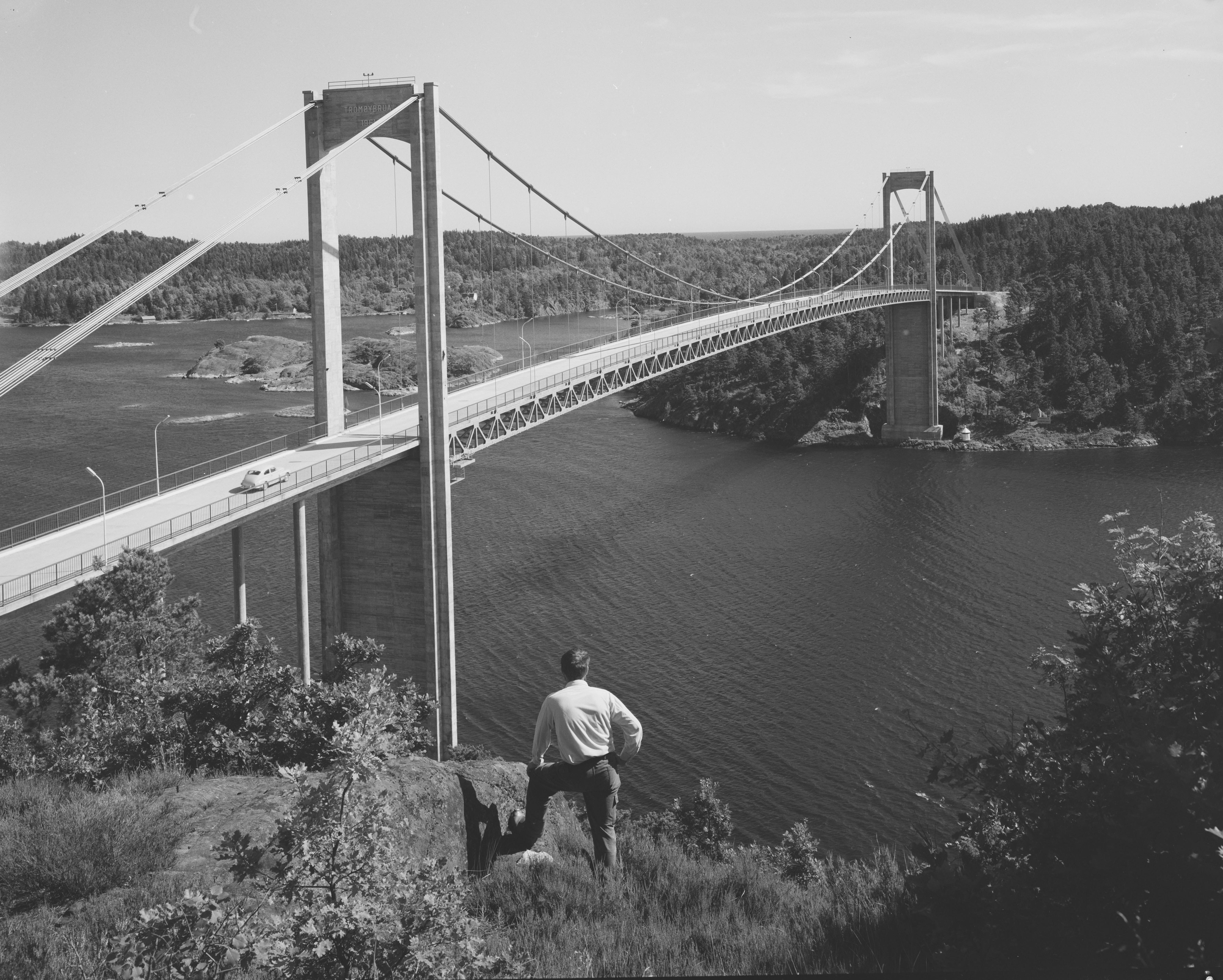 Bildet er hentet fra Nasjonalbibliotekets bildesamling Tromøya, Arendal, Aust Agder